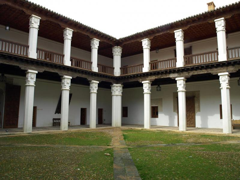 Palacio de Don Gutierre de Cárdenas en Ocaña (Toledo).